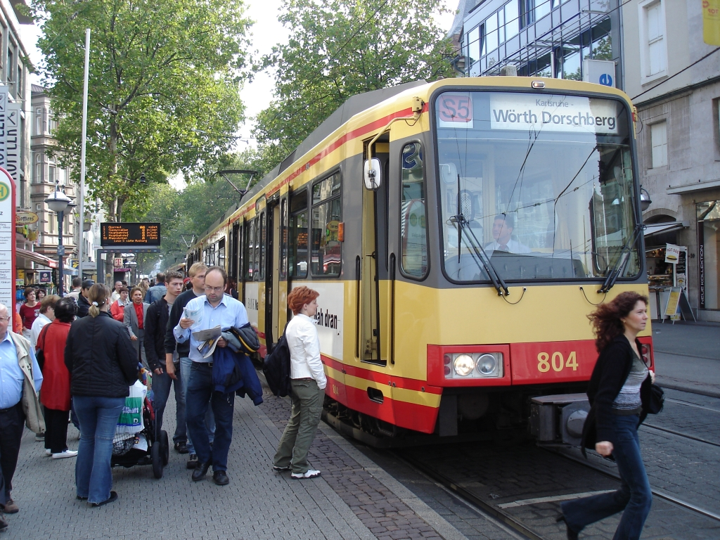 Tram in the Kaiserstraße, Karlsruhe, Germany